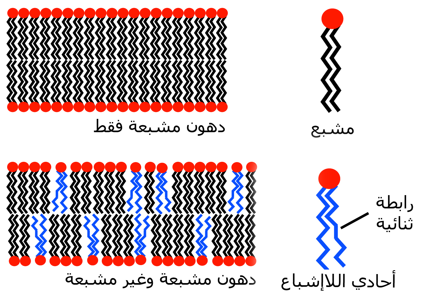 رسم تخطيطي يوضح تأثير الأحماض الدهنية غير المشبعة على بنية الغشاء.